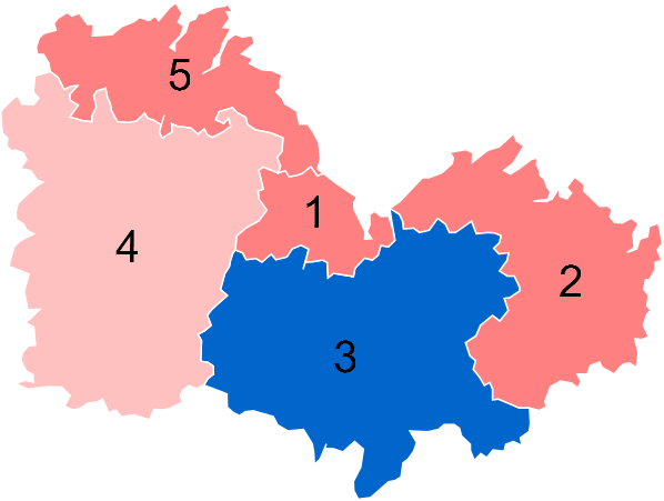 Résultats des élections législatives des Côtes-d'Armor en 2012